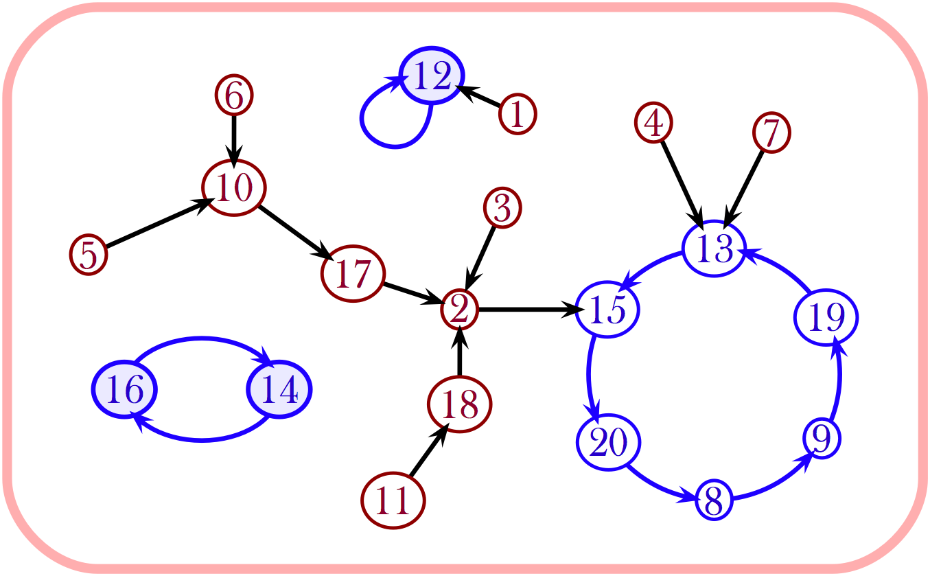 Représentation graphique d'une application ƒ de [ [ 1 , n ] ] {\displaystyle [\![1,n]\!]} dans [ [ 1 , n ] ] {\displaystyle [\![1,n]\!]} à l'aide d'un graphe orienté dont l'ensemble des sommets est [ [ 1 , n ] ] , {\displaystyle [\![1,n]\!],} et où les arètes relient chaque élément à son image par ƒ. Ici n=20 et ƒ = (12, 15, 2, 13, 10, 10, 13, 9, 19, 17, 18, 12, 15, 16, 20, 14, 2, 2, 13, 8), c'est-à-dire, ƒ(1) = 12, ƒ(2) = 15, ƒ(3) = 2, ... .